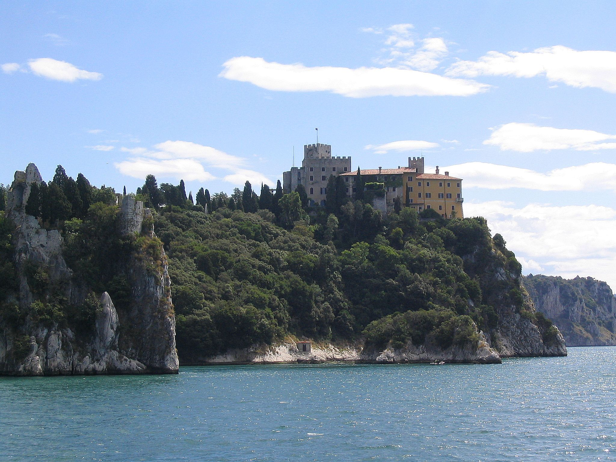 Neue Schloss Castello di Duino/Devinski grad